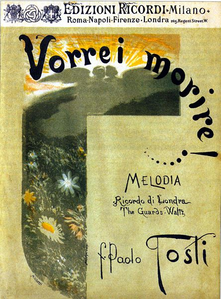 Portada de una partitura de Tosti, ilustrada por Michetti (1851-1929)